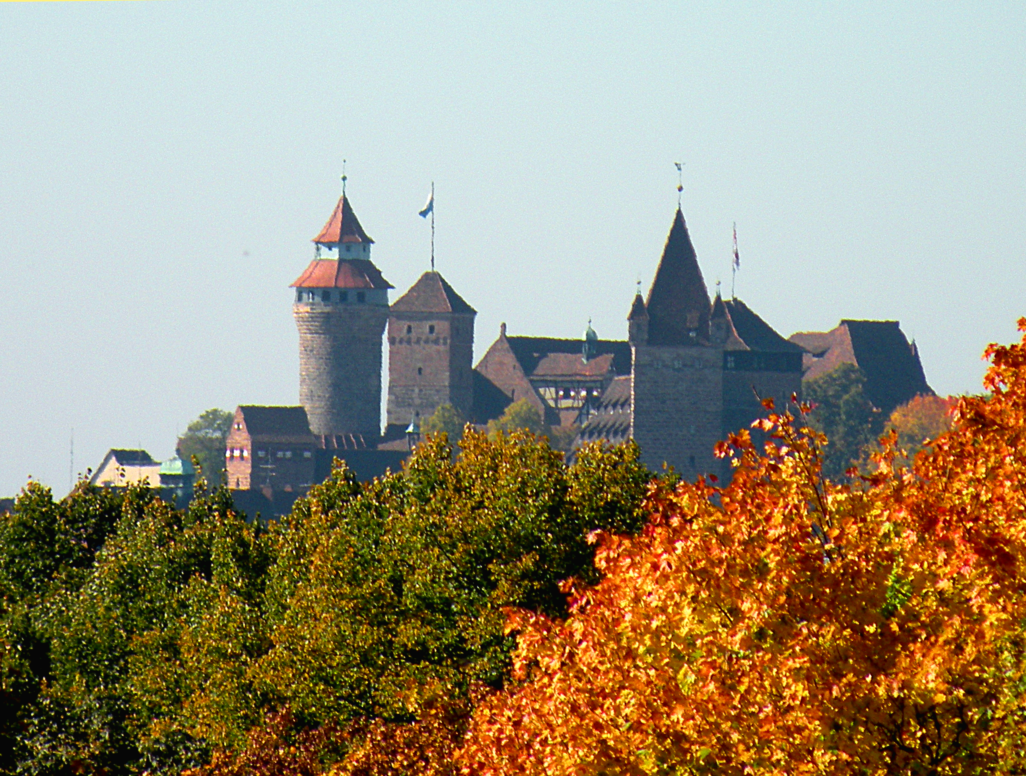 Нюрнберг.Бург вид с Рехенберга.